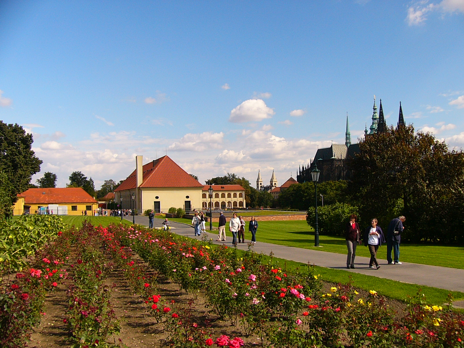 Lumbeho zahrada, květinový záhon